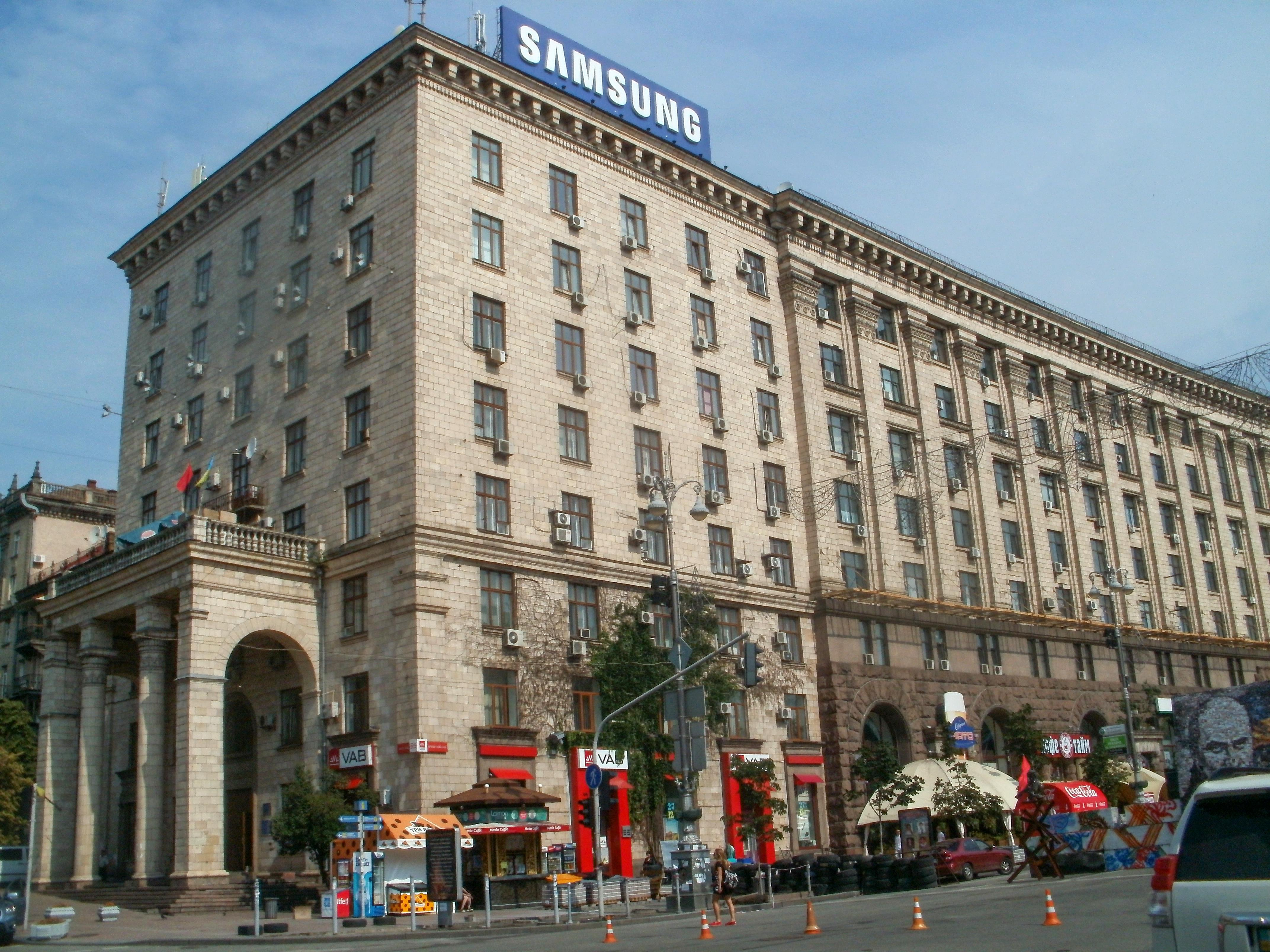 Будинок адміністративний міністерства культури УРСР, Київ, Хрещатик вул., 28/2